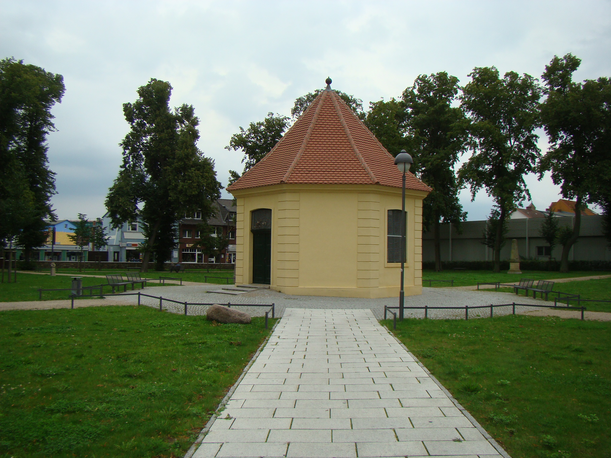 Zentralbau von 1799 im Marienhain in Demmin